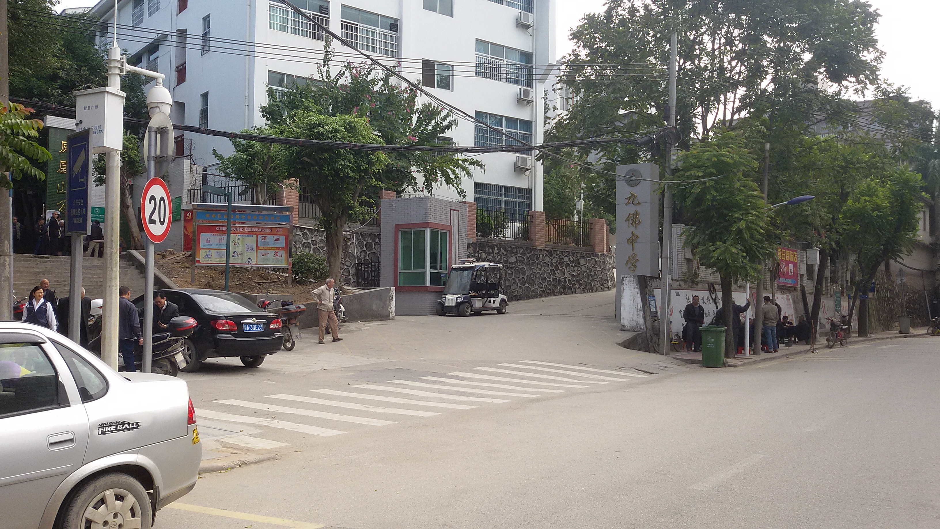 粵語: 九佛第一中學正門